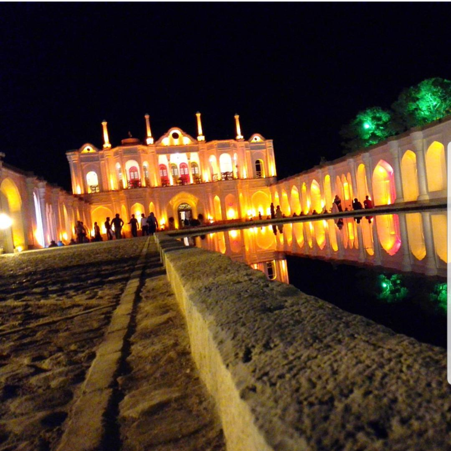 باغ عمارت بیگلر بیگی (فتح‌آباد) توسط امیرمهدی برزگری